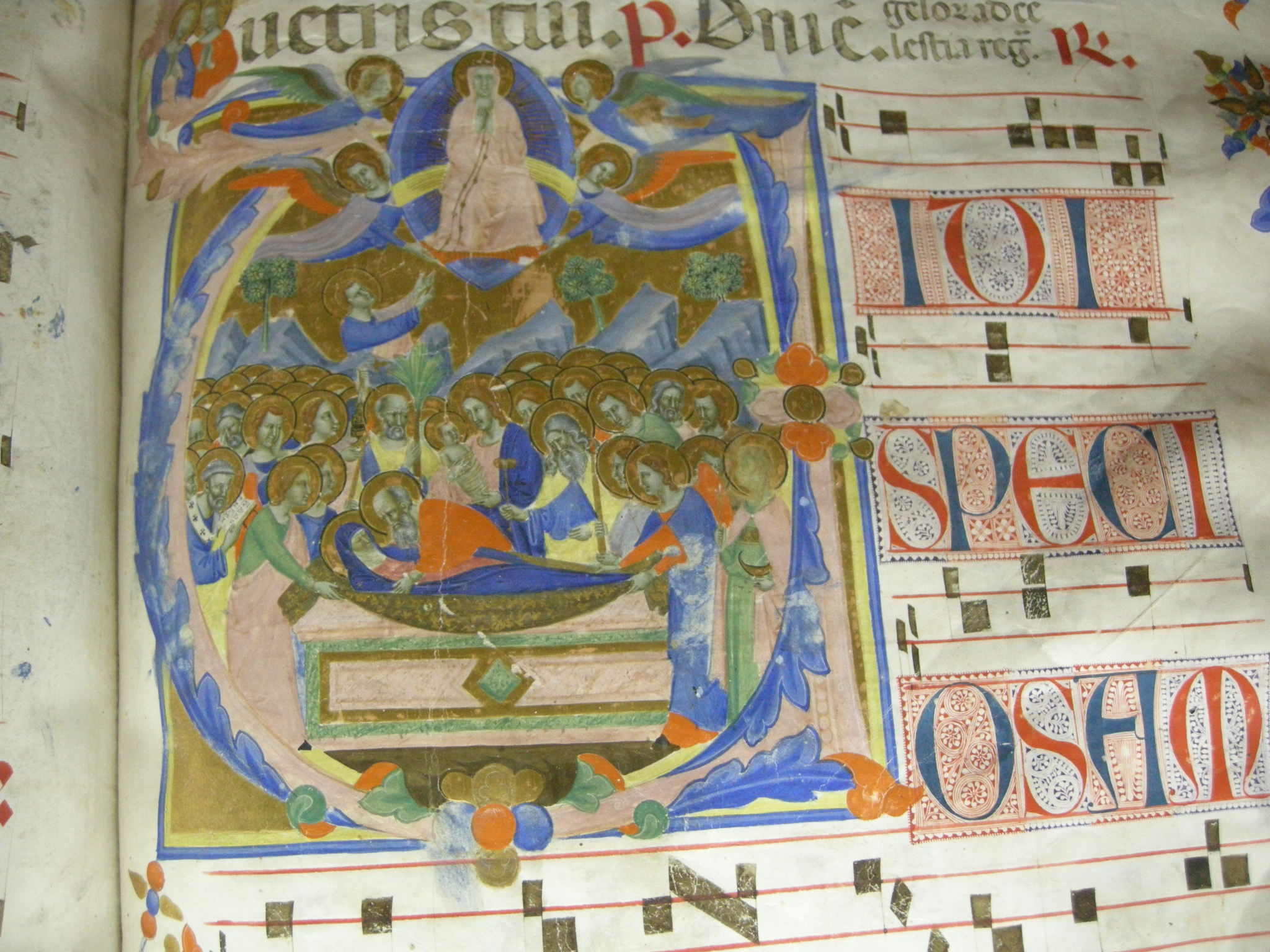 Primo miniatore pacinesco, e maestro delle effigi domenicane, antofonario, 1325-1350